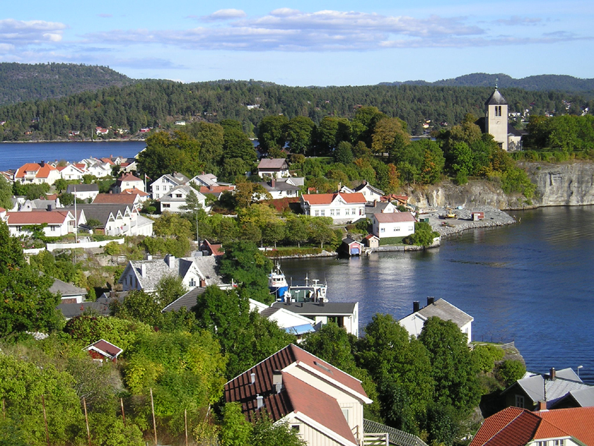 Brevik in Porsgrunn, Telemark, Norway.